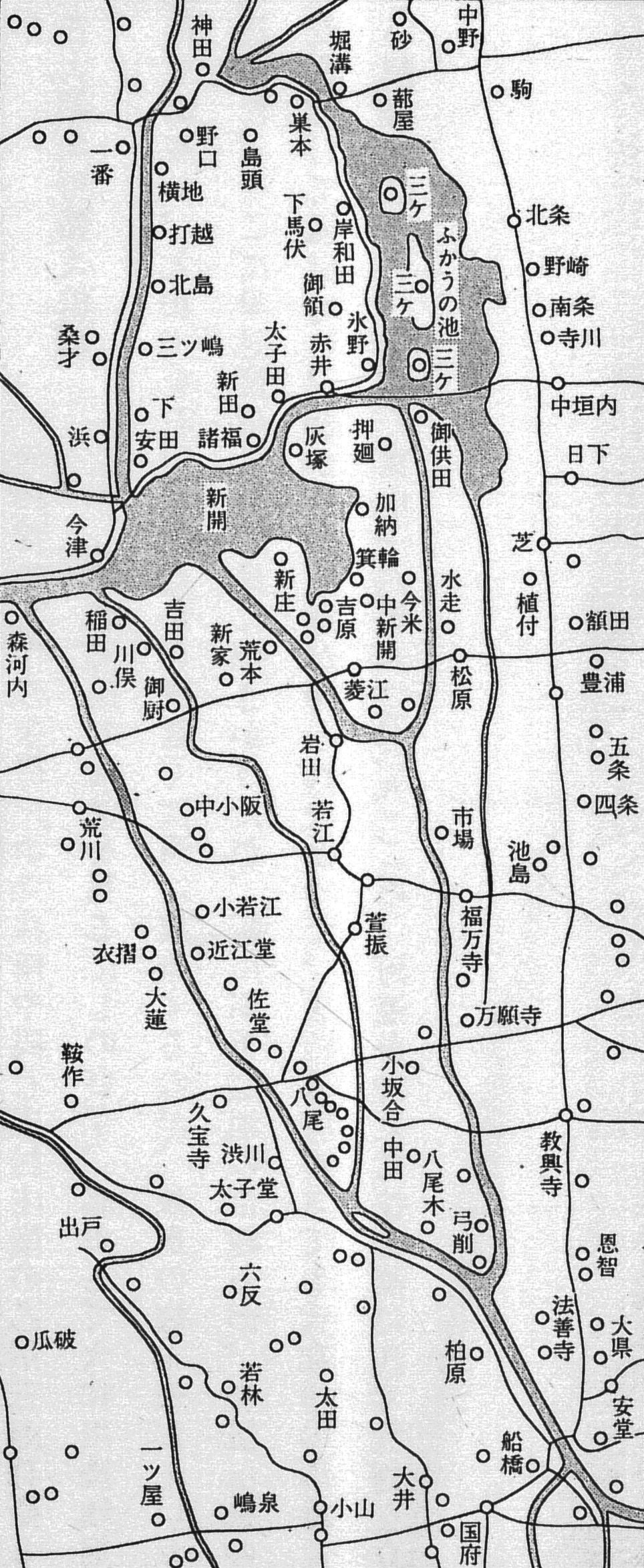 川違い前の大和川